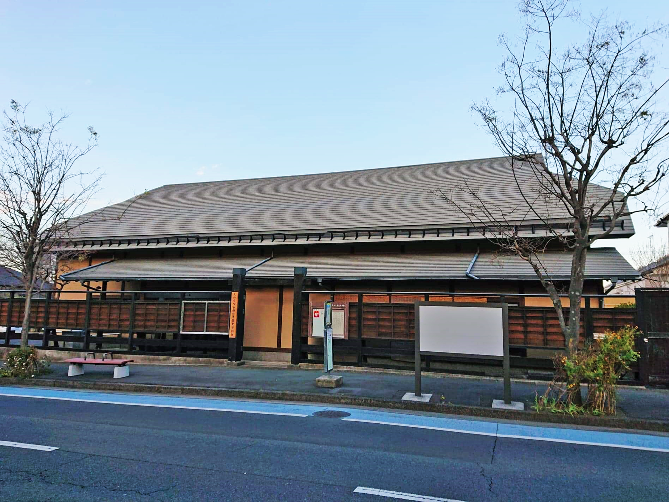 つる舞の里歴史資料館（神奈川県大和市）